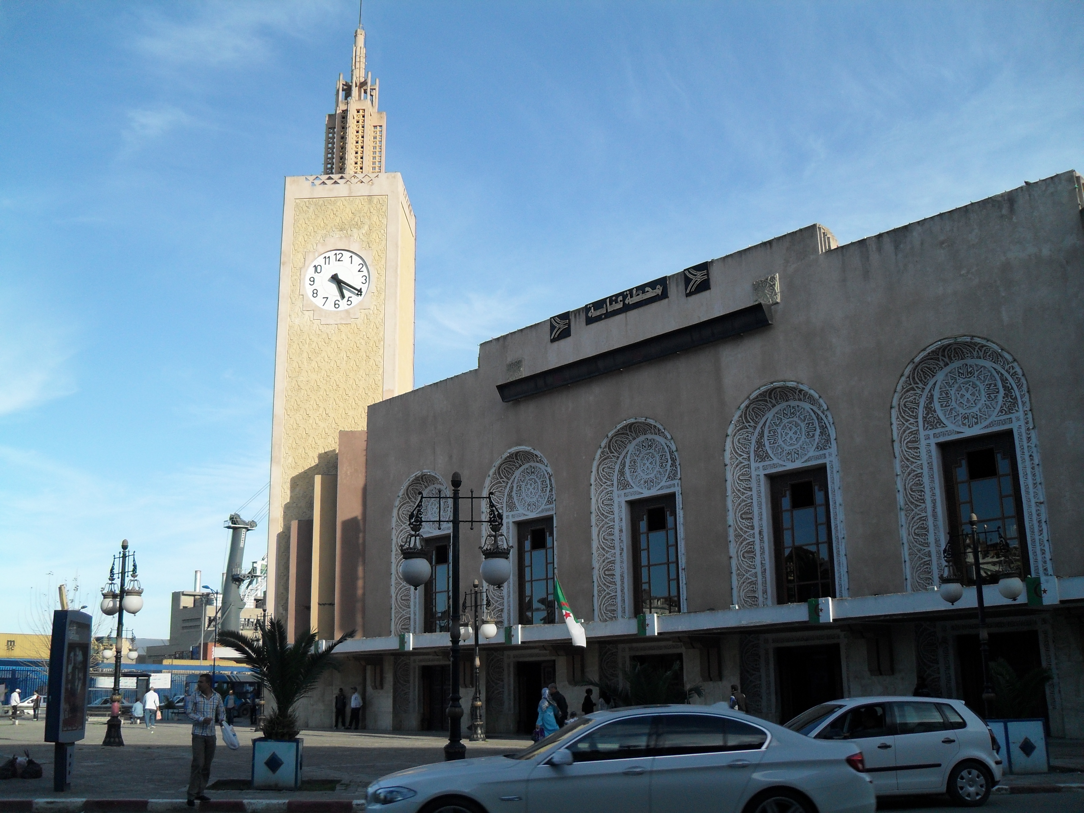 Esta es la estación de tren de la ciudad de Annaba (Argelia) frente al puerto.